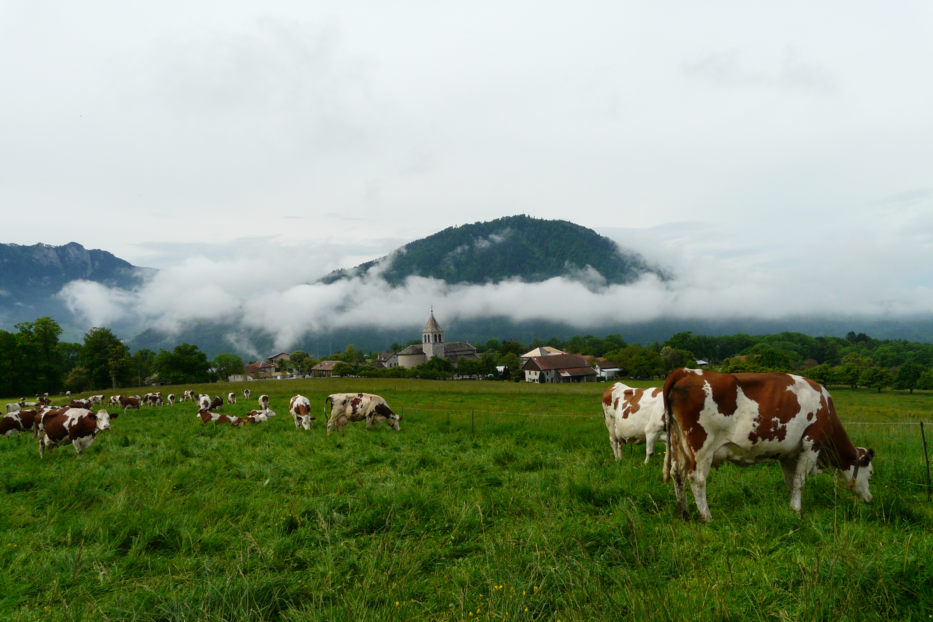 Vue du village de Féternes (Haute-Savoie, France)